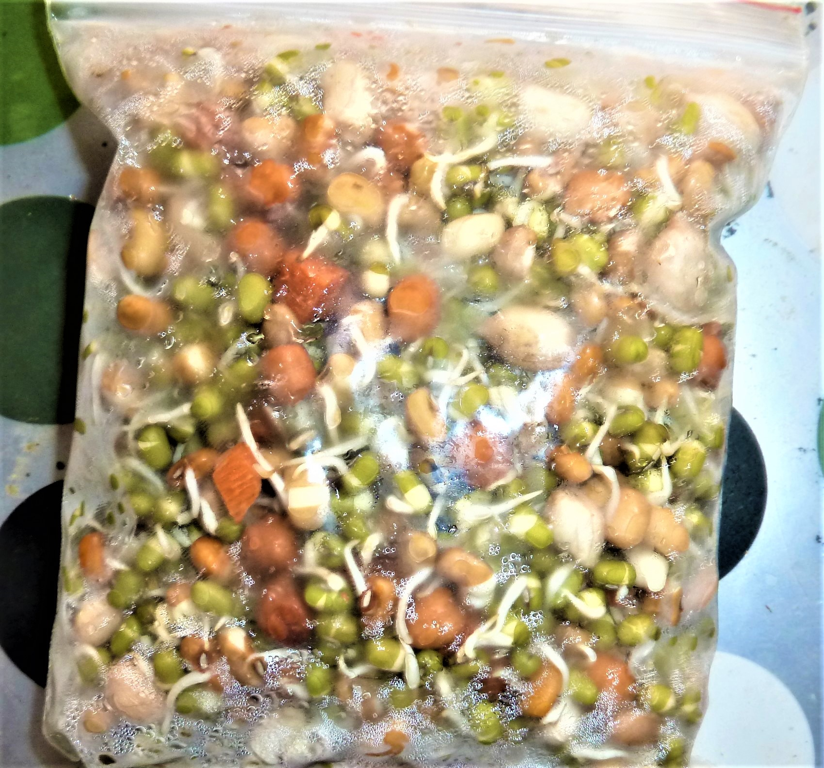 వివిధ రకములు గింజలు మొలకలు